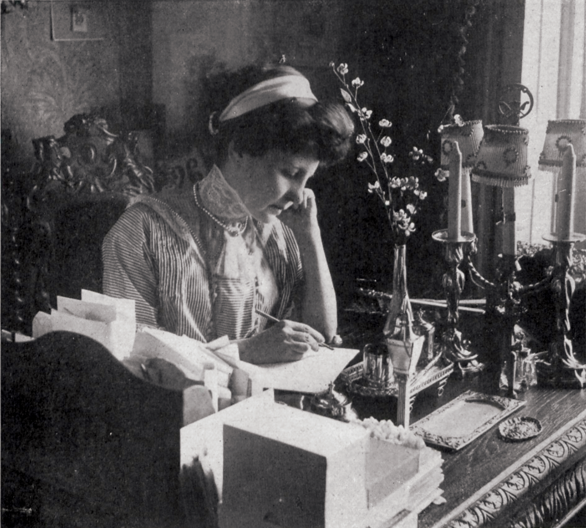 Fotografía de la escritora española Blanca de los Ríos.